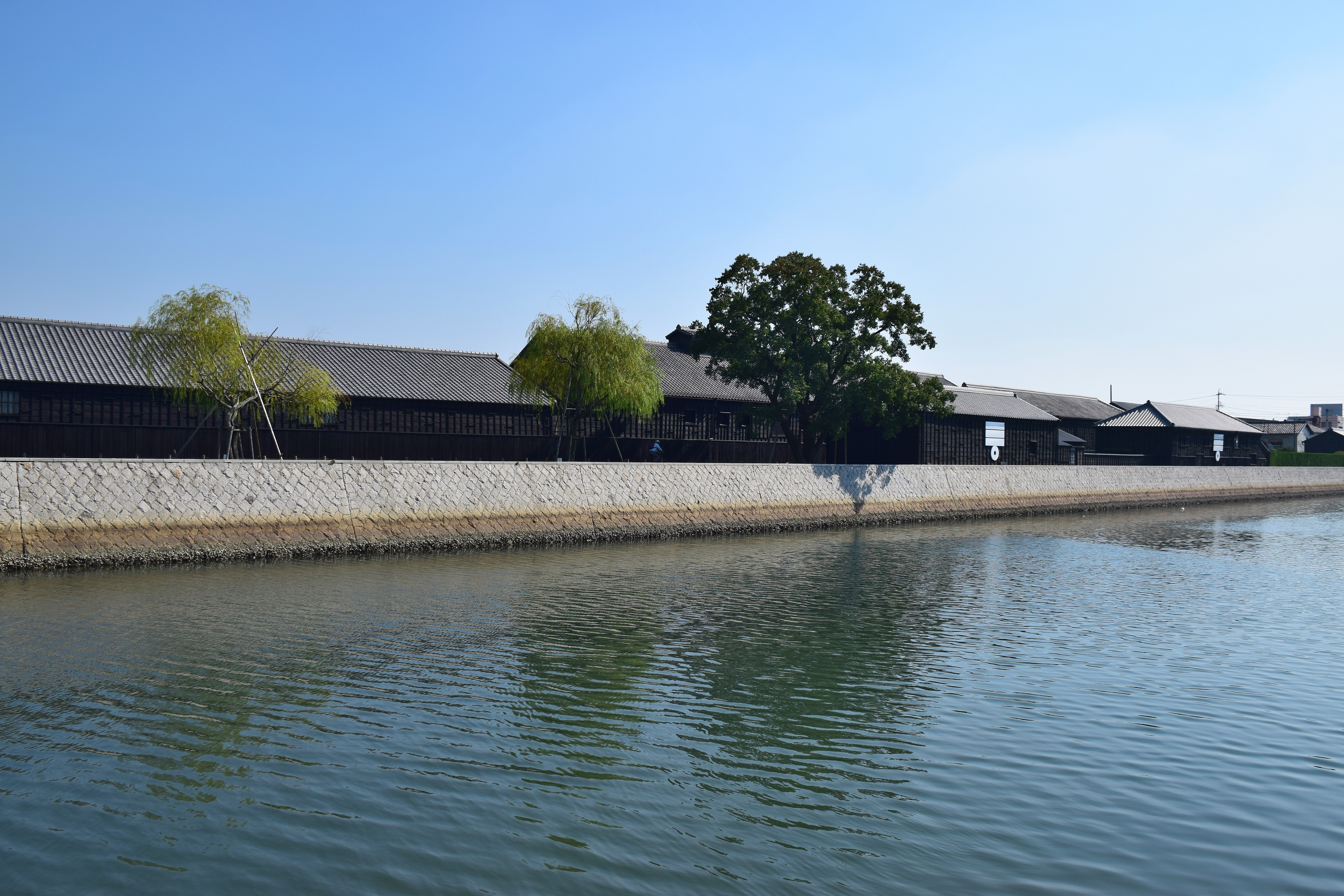 半田運河のミツカン倉庫